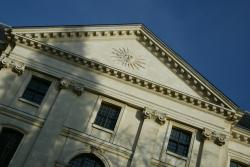 IAE de Lille